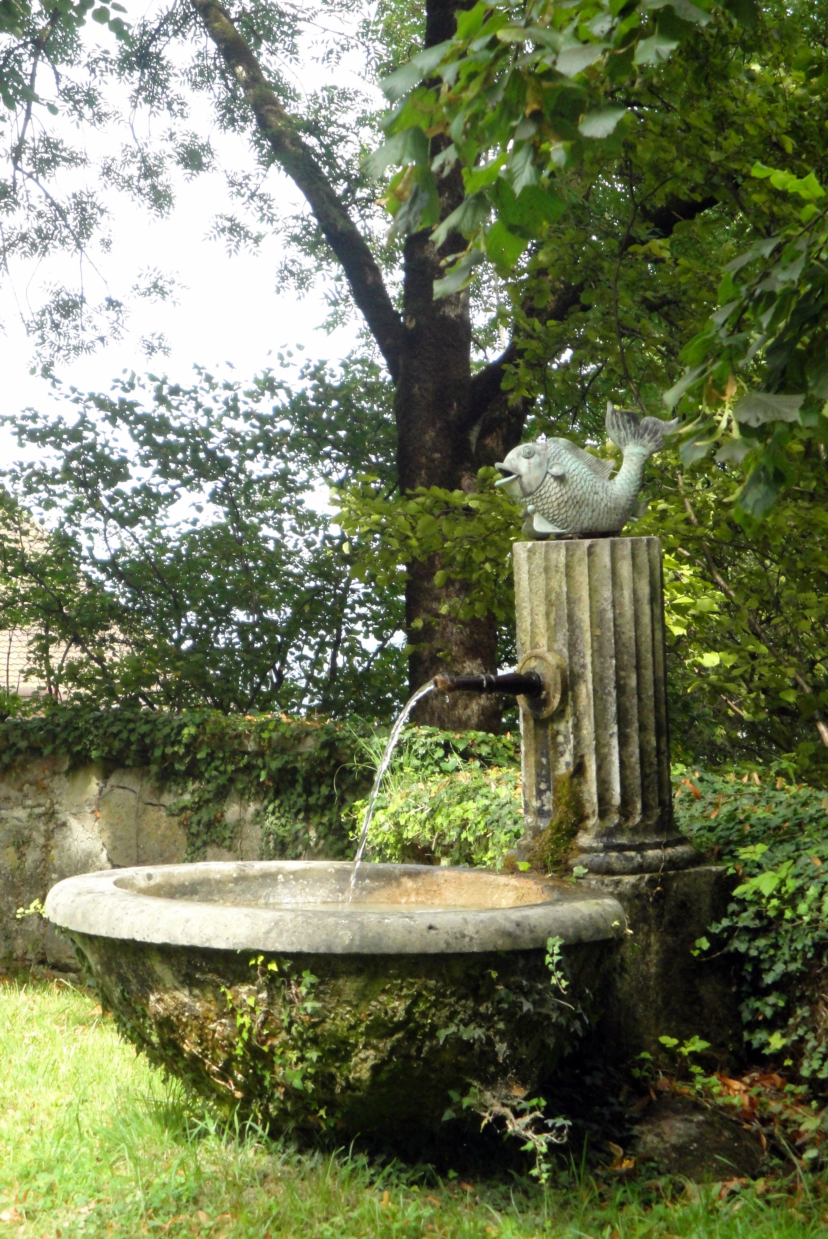 Rümligen, Brunnen im Schlosspark